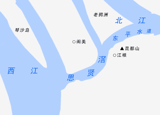 广东佛山三水区境内的思贤滘